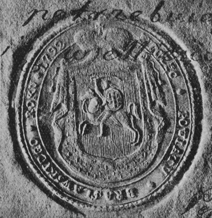 Беларуская (тарашкевіца): Пячатка Браслаўскага (Brasłaŭ) павету з «Пагоняй» («Pahonia»)